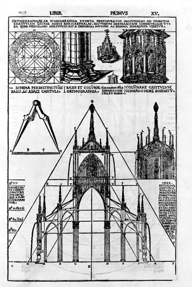 Studio sulle proporzioni e dettagli del Duomo di Milano, in un'incisione dell'architetto Cesare Cesariano, tratta dal De architectura di Vitruvio, edizione del 1521.